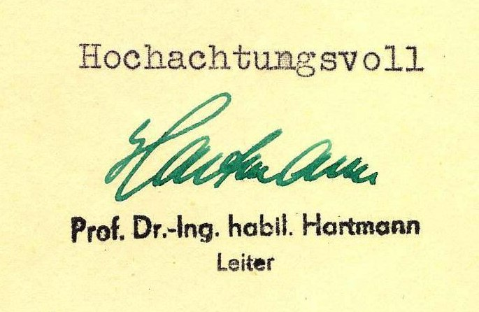 Unterschrift von Werner Hartmann